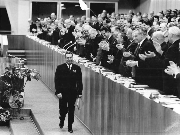 Zentralbild Gahlbeck 18.4.1967 Th-Qu VII. Parteitag der SED - 18.4.1967. Der Generalsekretär der ZK der KPdSU, Leonid Breshnew, verlässt unter dem Jubel der Delegierten und Gäste nach seiner Rede an den Parteitag das Rednerpult. Im Präsidium (1. Reihe v.r.n.l.:) Herbert Warnke, Mitglied des Politbüros des ZK der SED; Chivu Stoica, Mitglied des Exekutivkomitees und des Ständigen Präsidiums des ZK der RKP; Paul Verner, Mitglied des Politbüros des ZK der SED; (fast verdeckt) Max Reimann, Erster Sekretär des ZK der KPD; Kurt Hager, Mitglied des Politbüros des ZK der SED; Nguyen Duy Trinh, Mitglied des Politbüros des ZK der Partei der Werktätigen Vietnams; Gerhard Grüneberg, Mitglied des Politbüros des ZK der SED; Stanko Todorow, Mitglied des Politbüros des ZK der RKP; (fast verdeckt) Paul Fröhlich, Mitglied des Politbüros des ZK der SED; Jiri Hendrych, Mitglied des Politbüros des ZK der SED; (fast verdeckt): die Mitglieder des Politbüros des ZK der SED Willi Stoph und Erich Honecker, der Erste Sekretär des ZK der SED Walter Ulbricht.